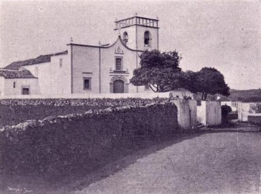 "Egreja parochial da freguesia de S. Pedro", freguesia de São Pedro, concelho de Vila do Porto, ilha de Santa Maria, Açores, in Álbum Açoriano, fascículo nº 36, 1903, p. 287.